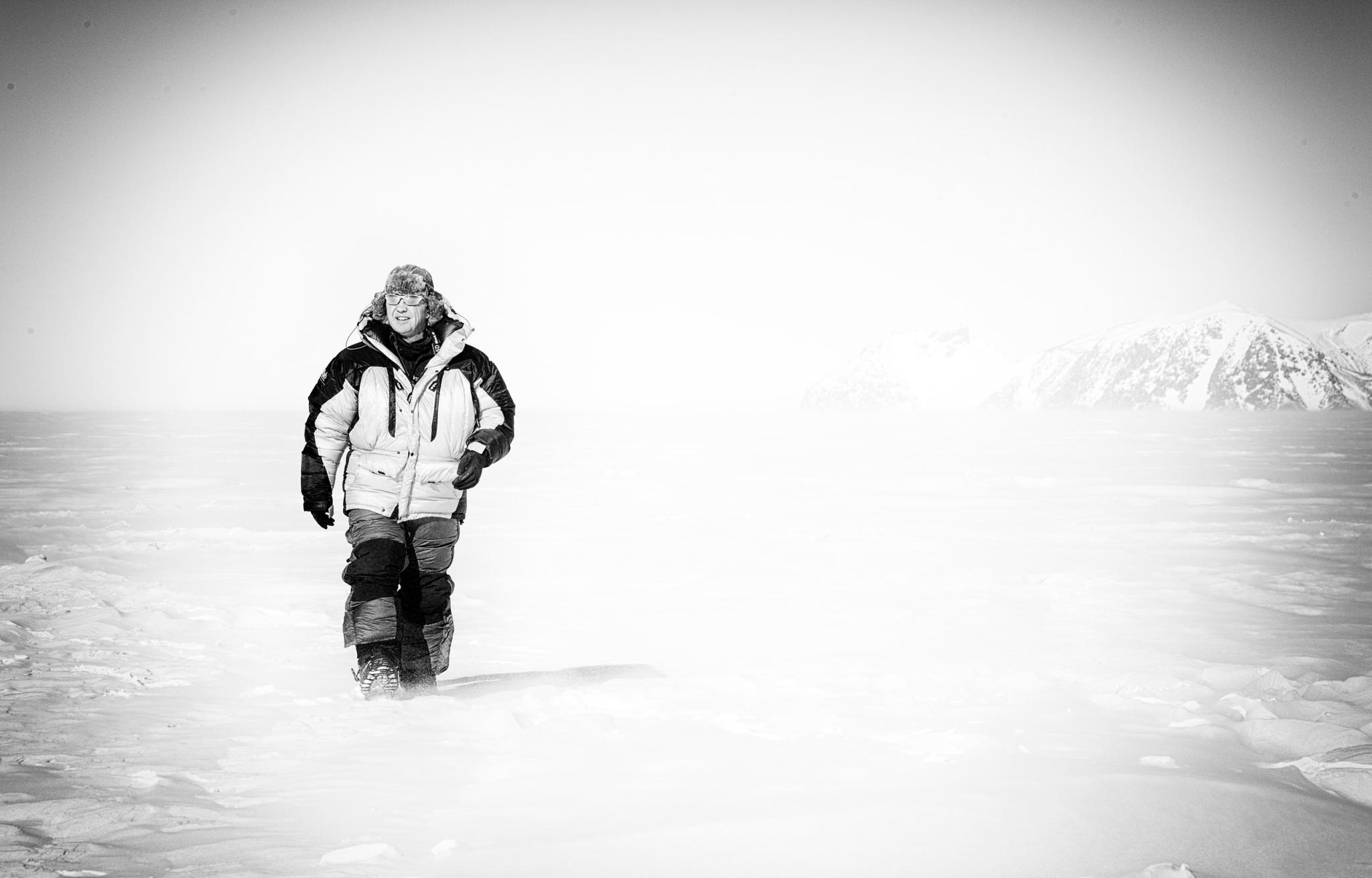 Doug Allan Cameraman